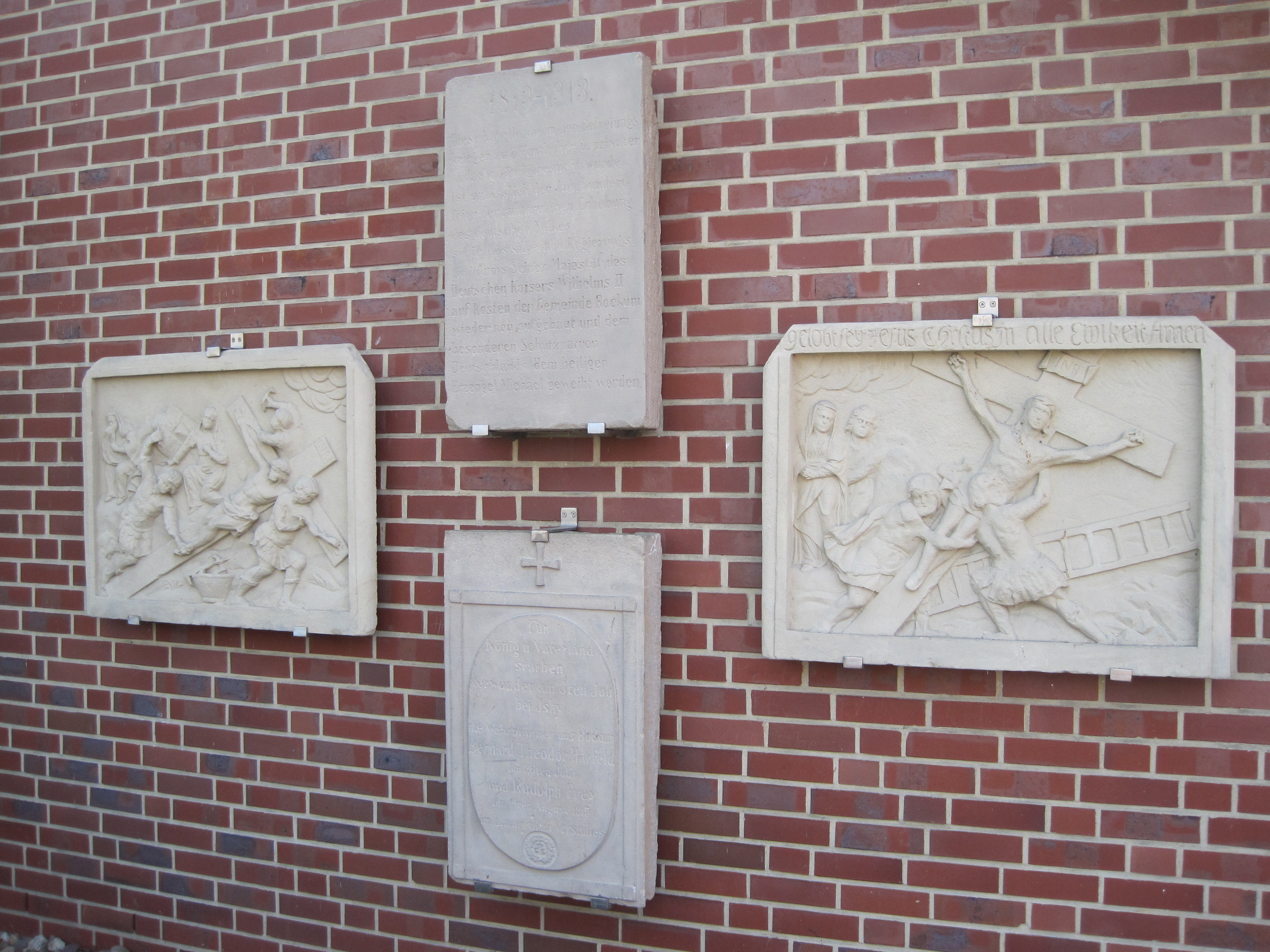 Das Foto zeigt vier Sandsteintafeln, aufgehängt am Gemeindehaus der St. Stephanuskirche in Hamm-Bockum-Hövel. Es handelt sich um Überreste der früheren St. Michaelskapelle.